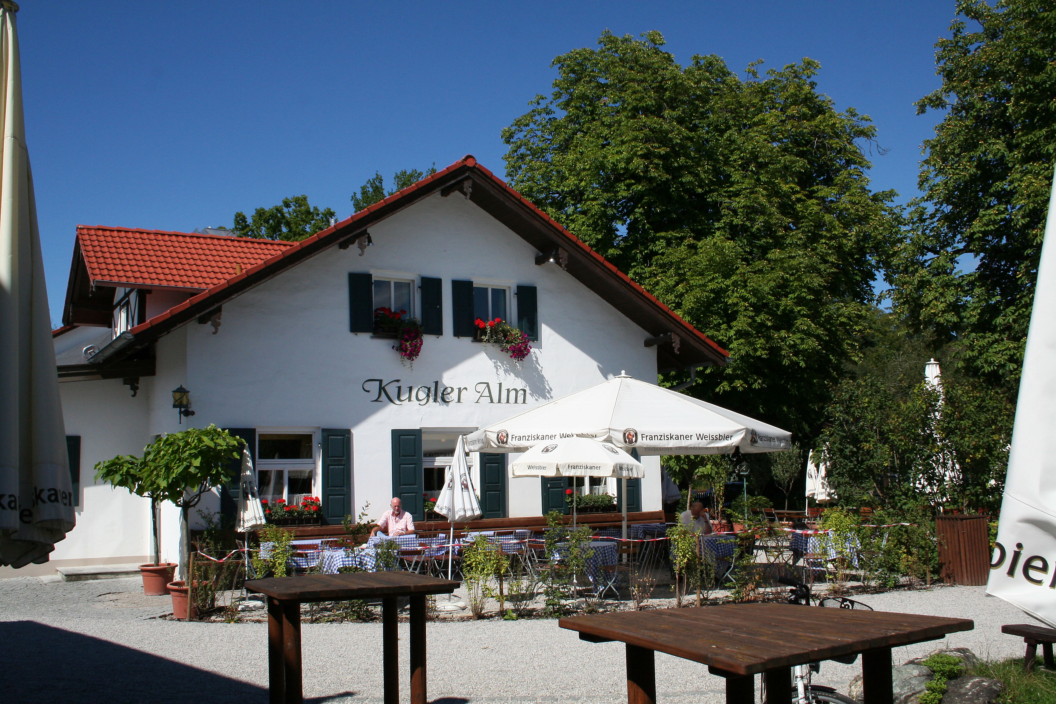 Die Kugler Alm